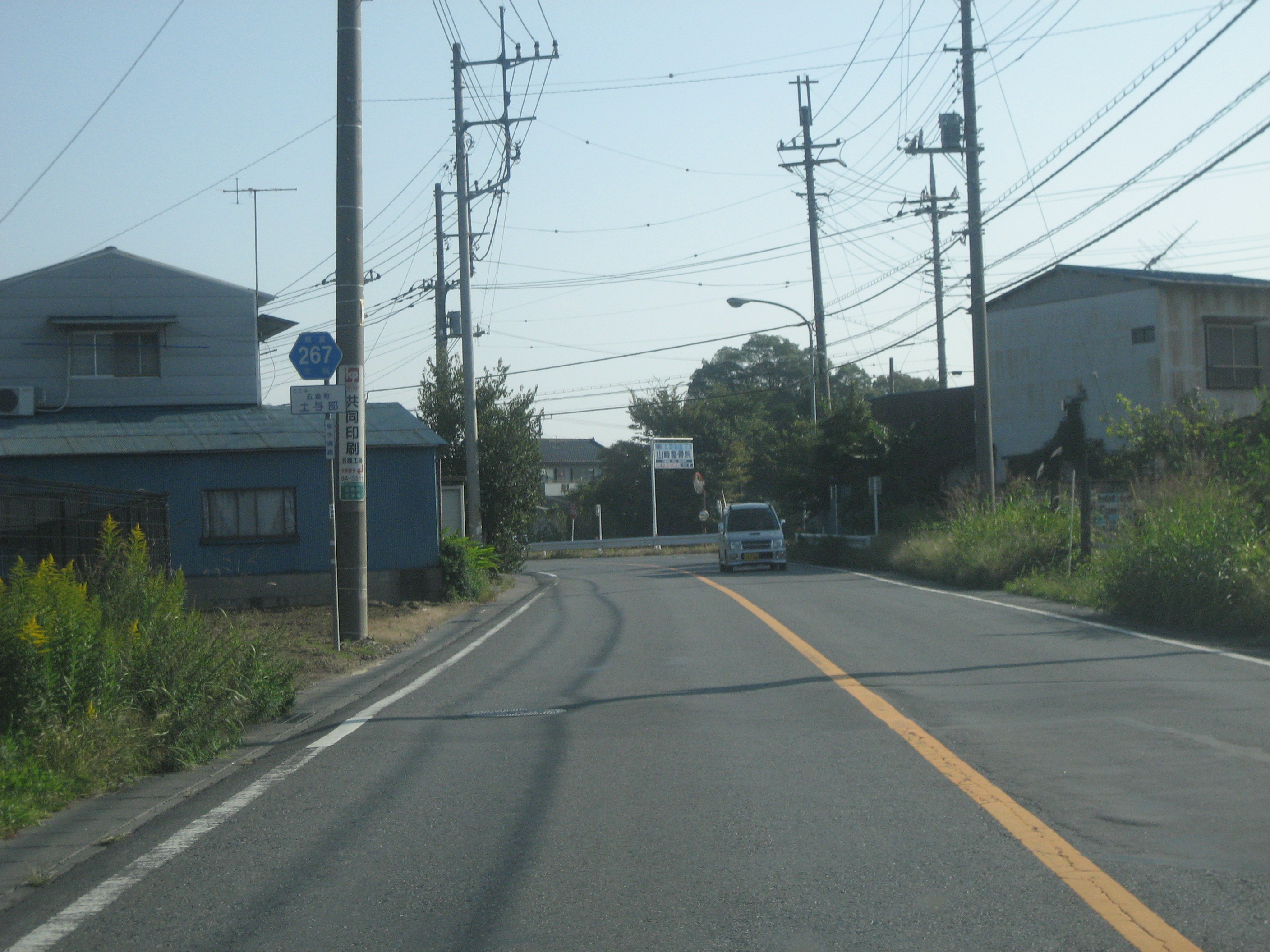 茨城県道267号線五霞町内